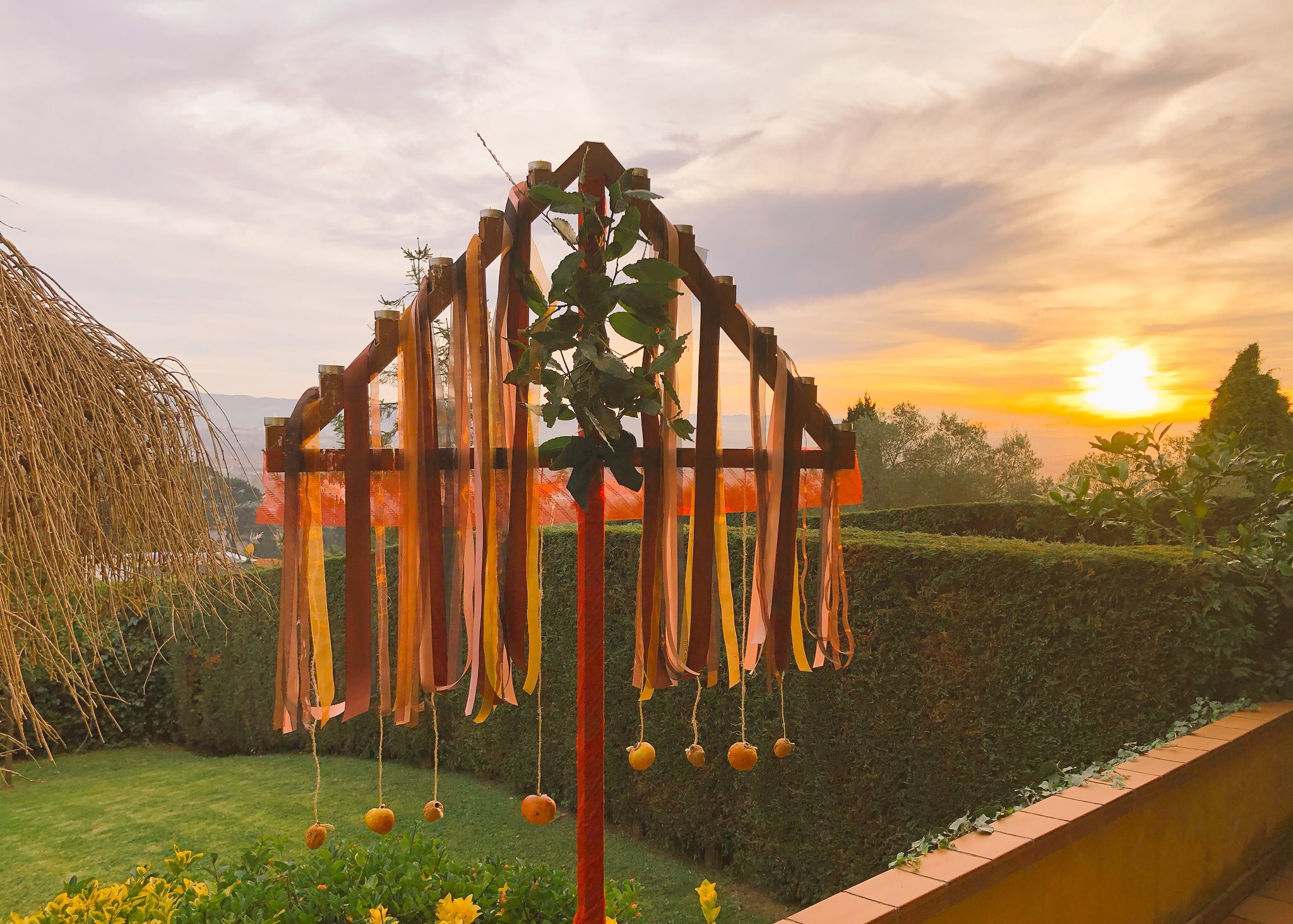 Ramu nadal. Elementu votivu ornamental nel día del solsticiu d'iviernu y fiestes de nadal. Somió (Xixón, Asturies).